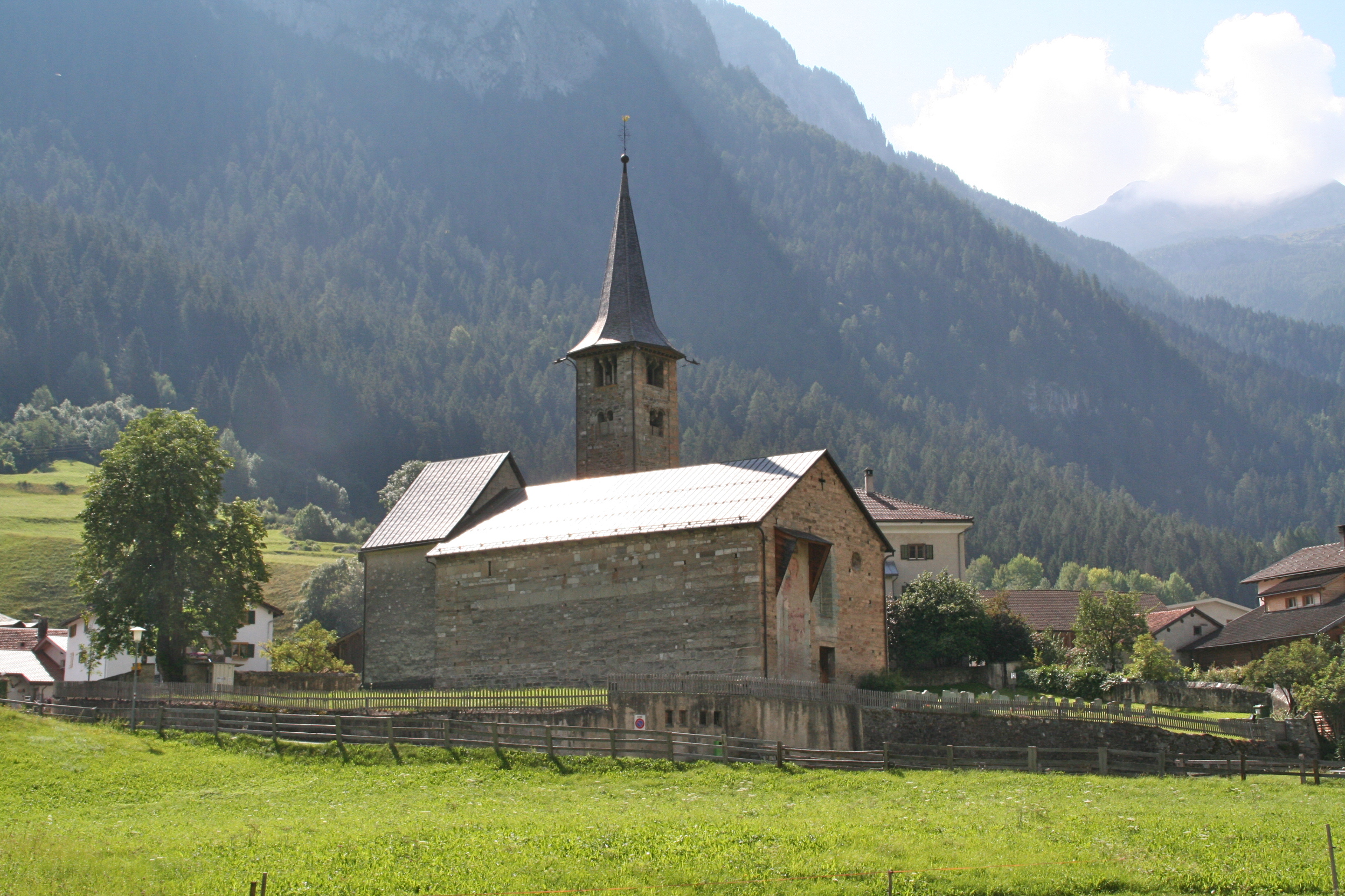 Church St. Martin (Zillis) Ansicht von Norden